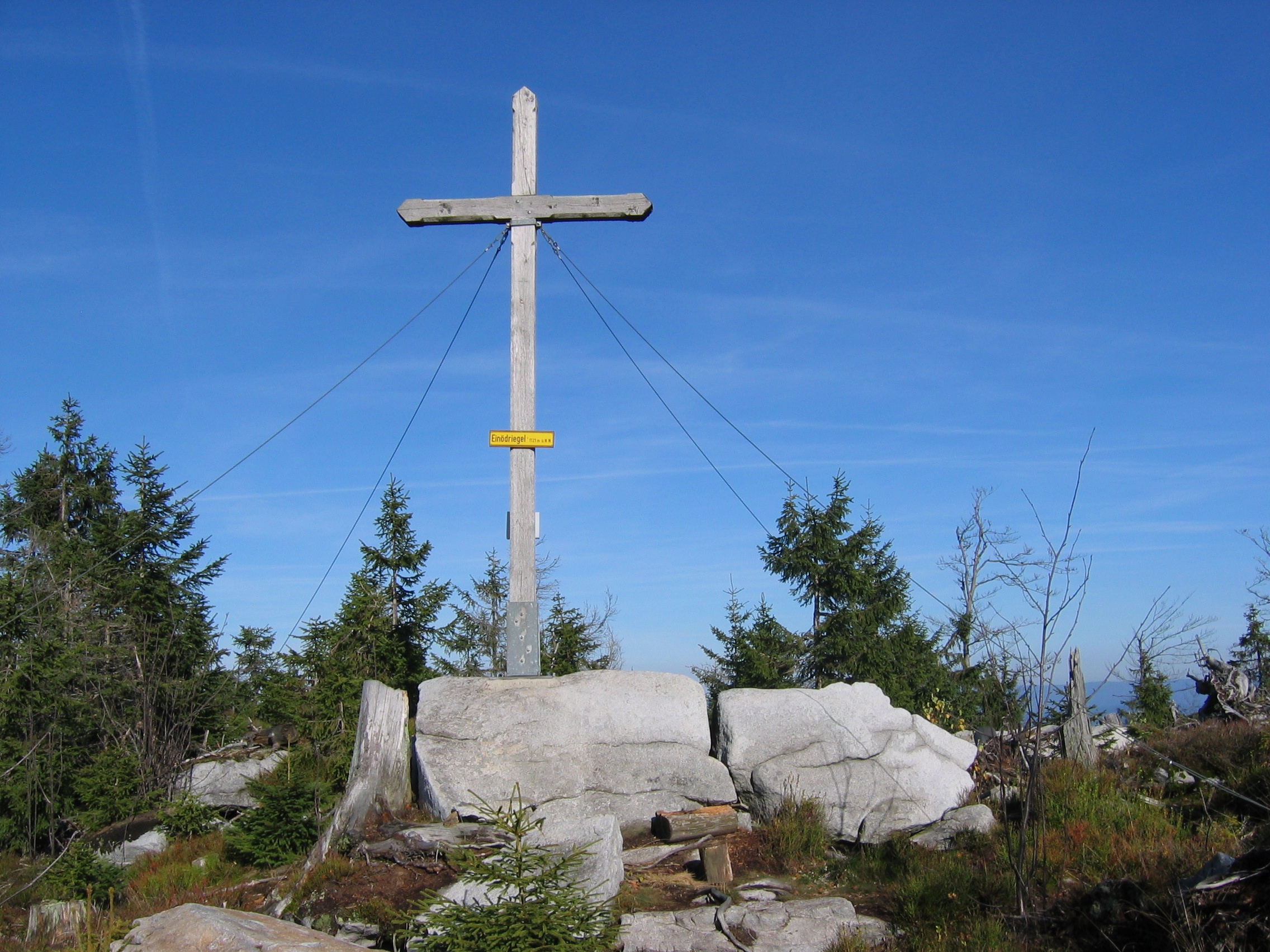 Gipfel Einödriegel